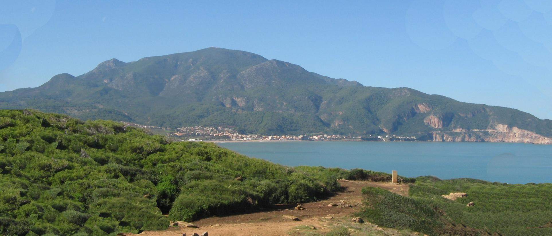 Djebel Chenoua (sommet 900m, N36.6 E2.383333). Cette montagne est dite avoir la forme d'une femme enceinte allongée.